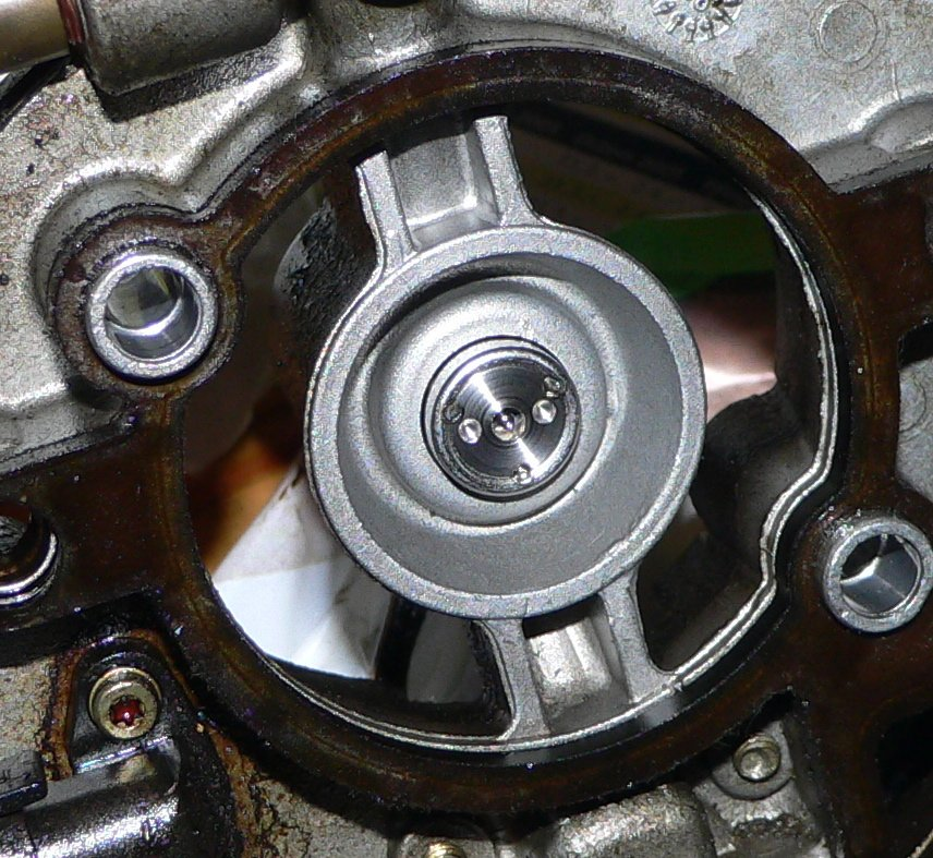 Einspritzdüse eines Ottomotors, selbst fotografiert